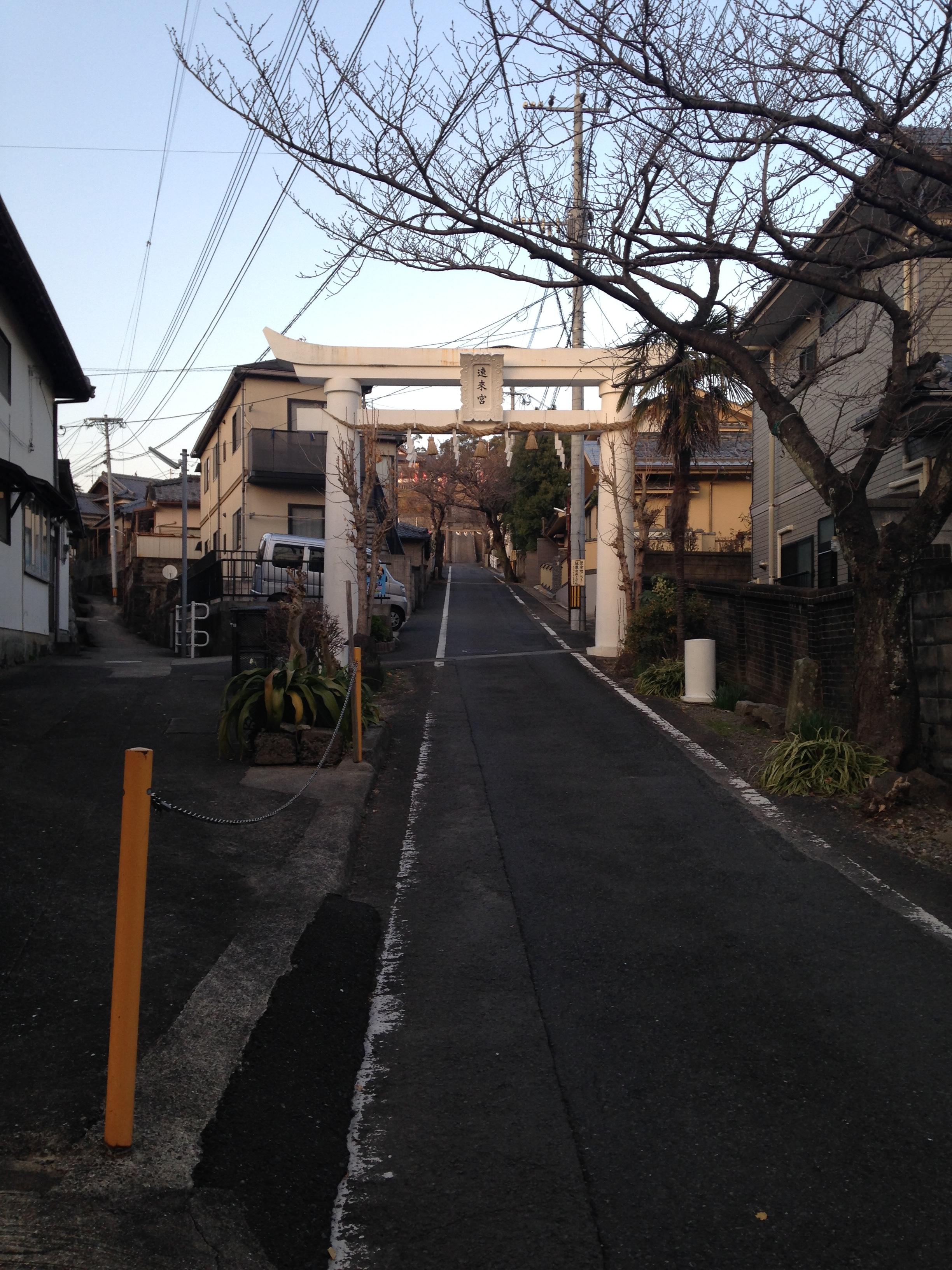 早岐神社の参道と鳥居